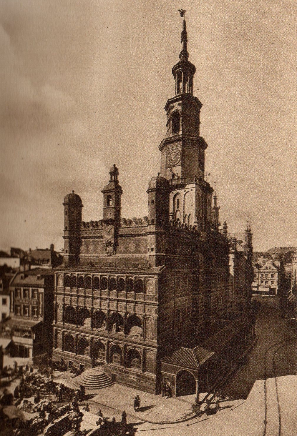 Stary Rynek w Poznaniu w okolicach PeWuKi, 1929r.